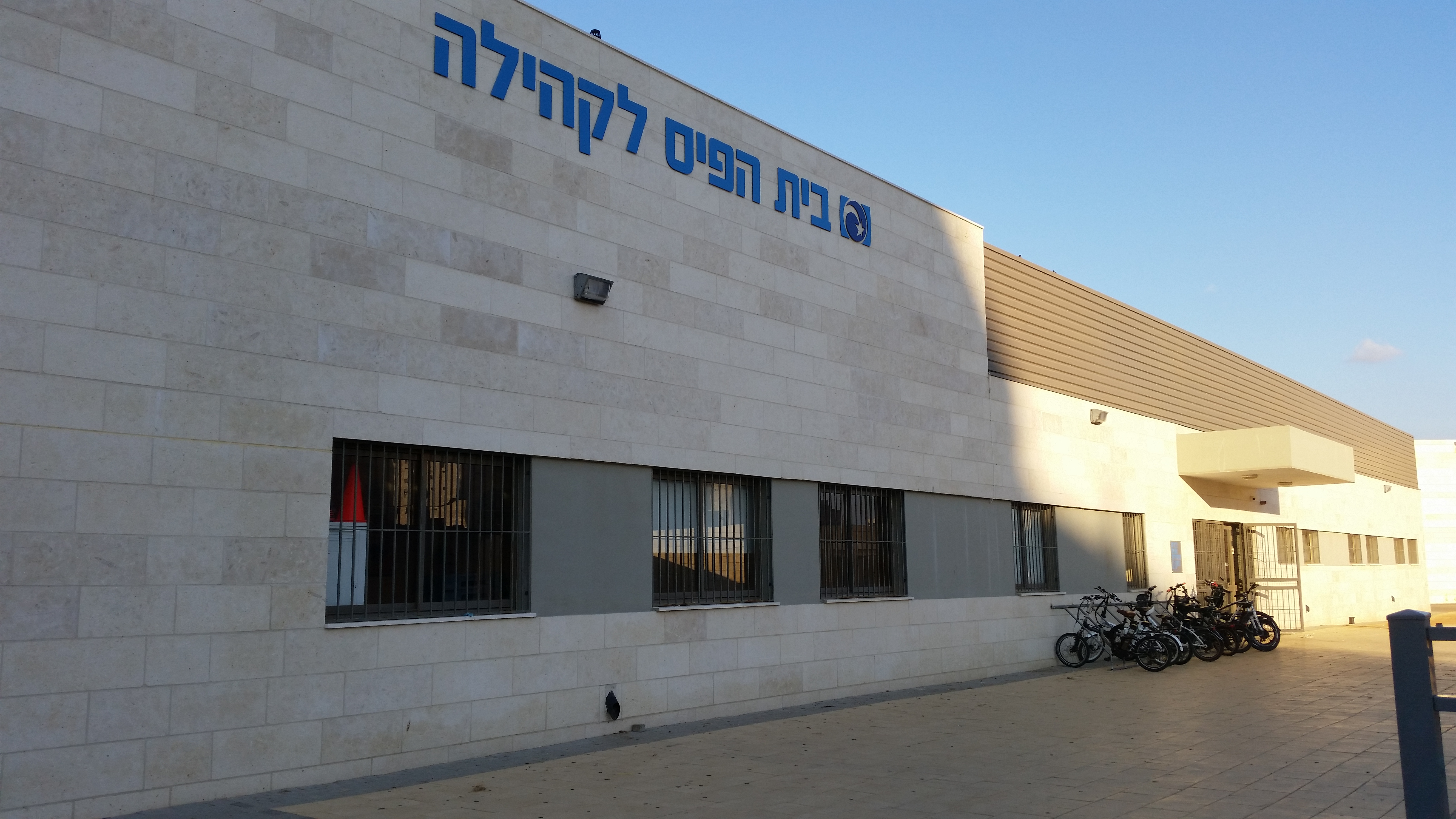 היכל הספורט "בית הפיס" באשדוד